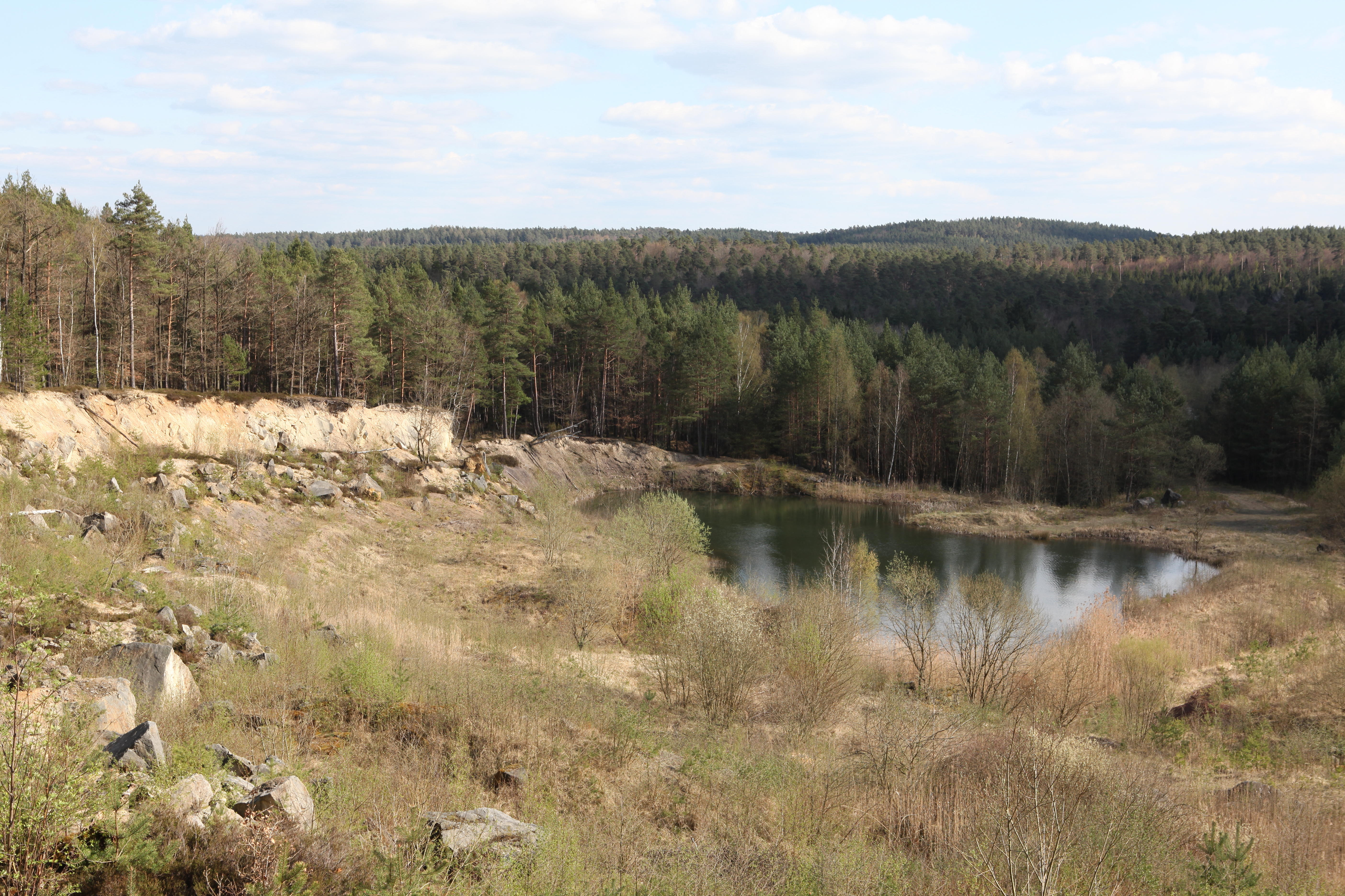 Muggenbach, Rote Tongrube, NSG Tongruben bei Muggenbach